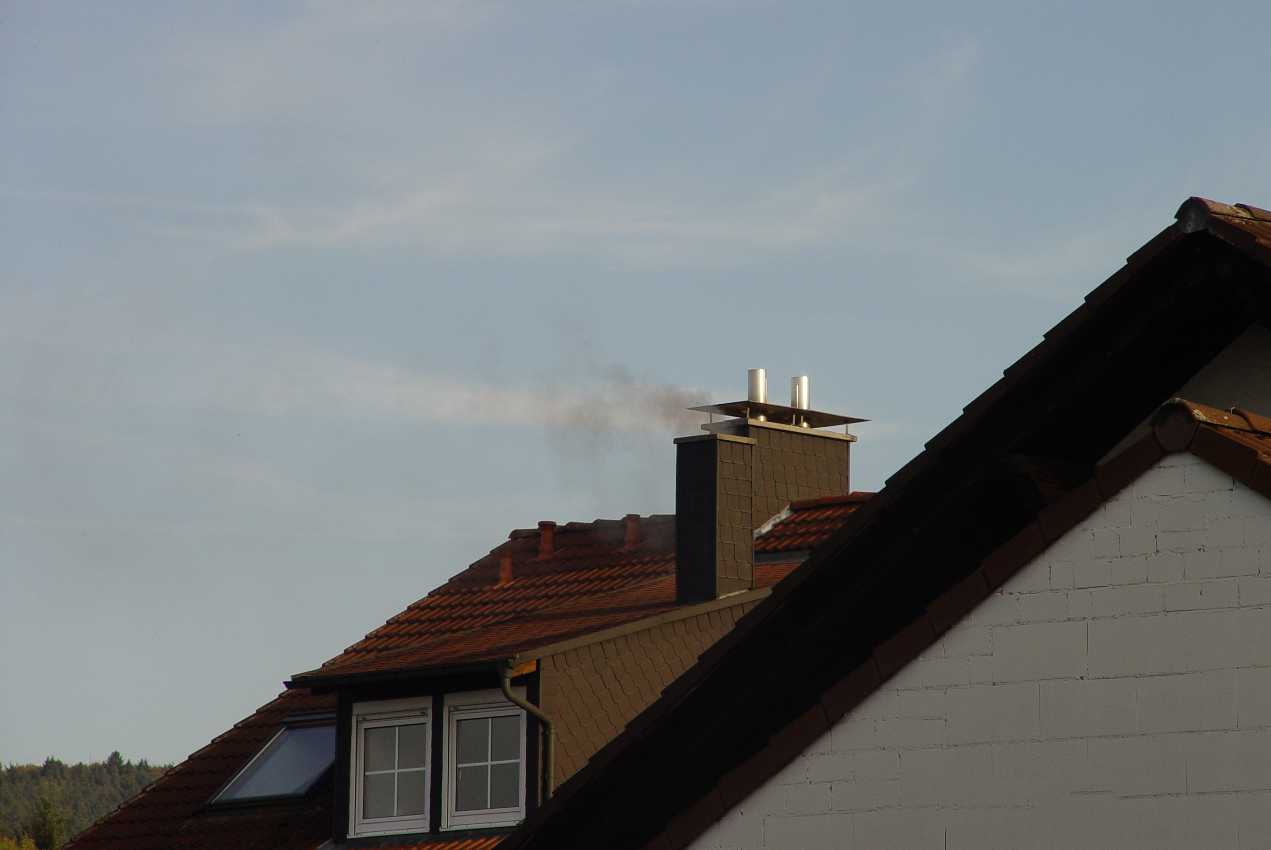 Rauch einer Holzfeuerung